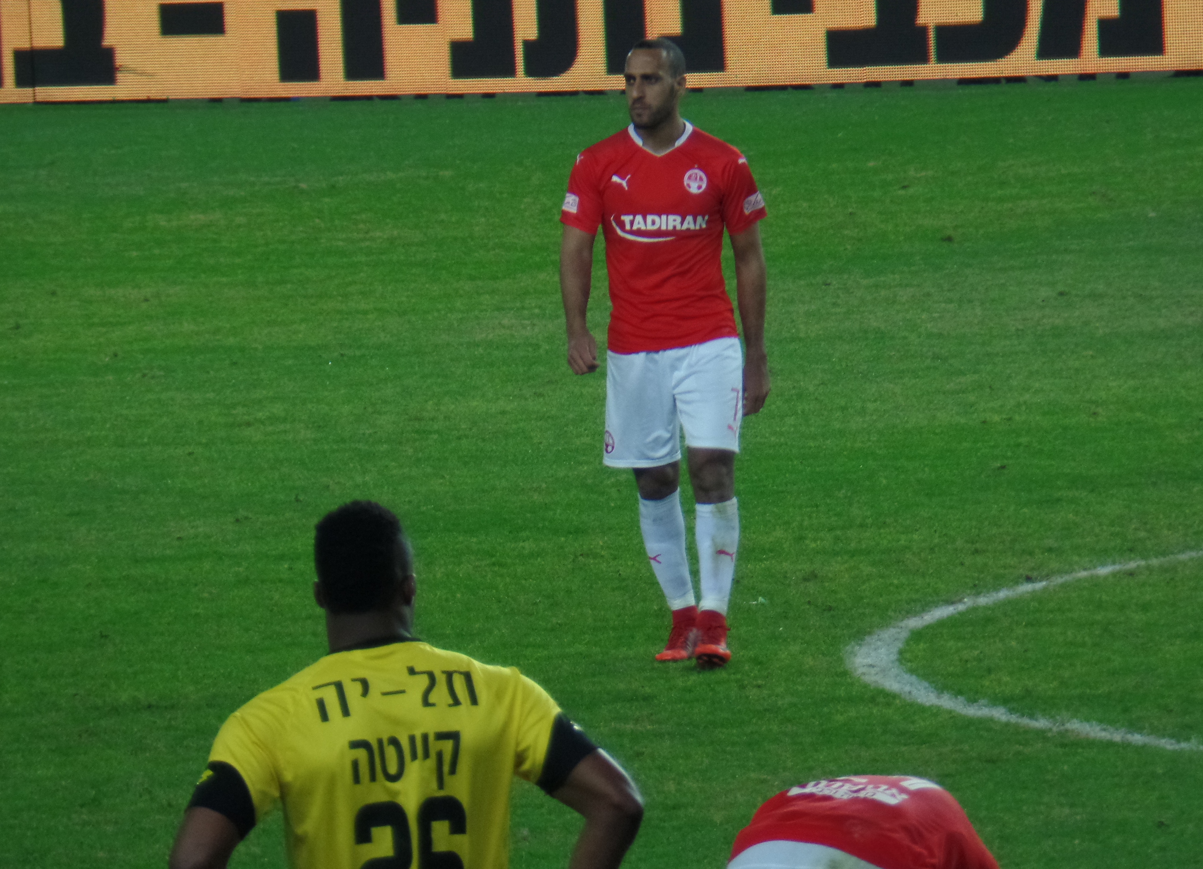 מהראן ראדי, במדי הפועל באר-שבע, 2017